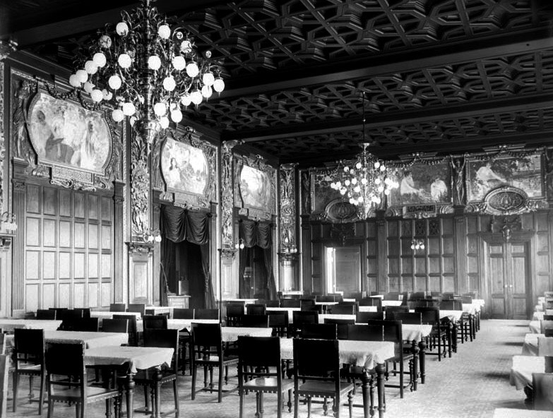 Interiör från Operakällarens matsal, Karl XII:s Torg, Stockholm